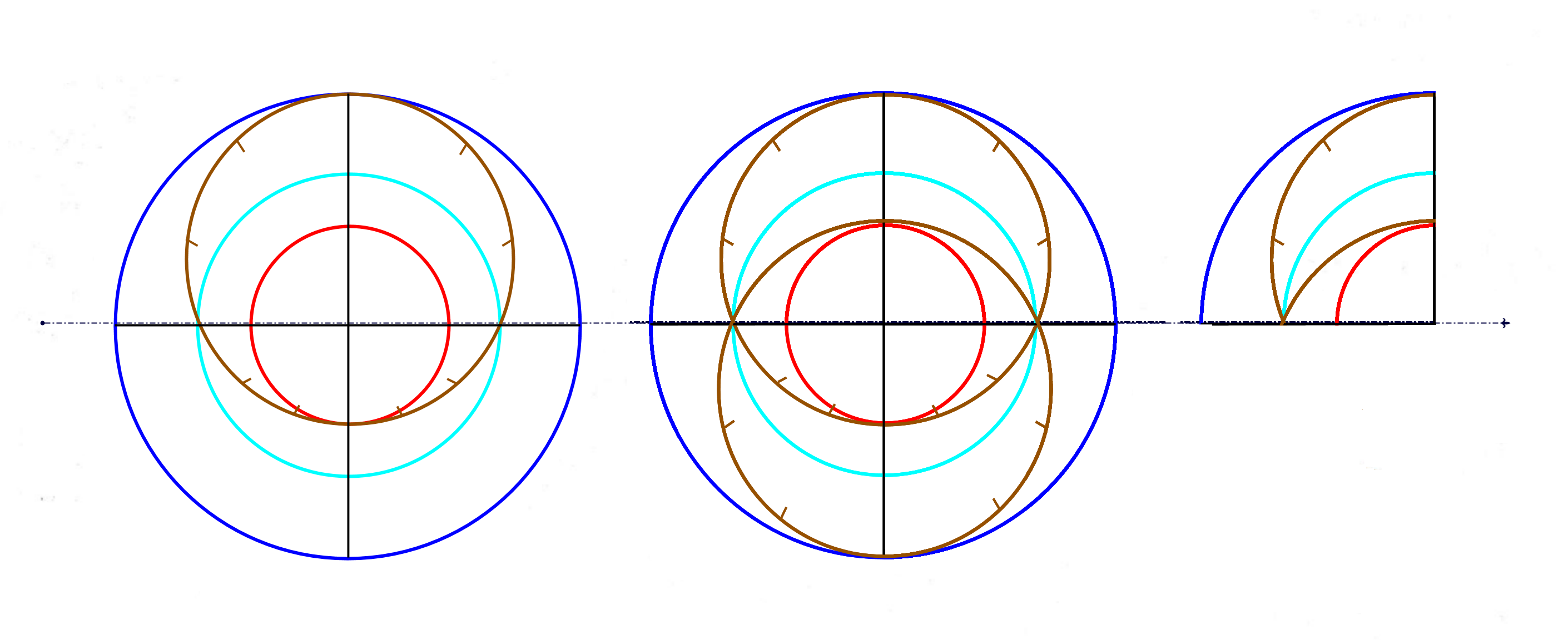 De l'astrolabe au quadrant ottoman par projection stéréographique et rabattements.